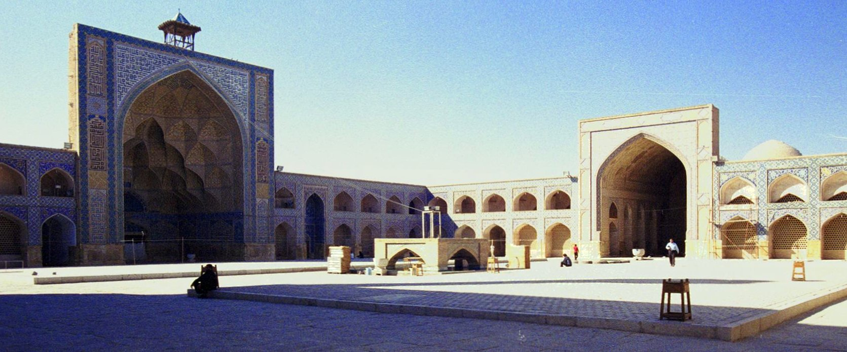 Jameh Mosque (Friday Mosque), Isfahan